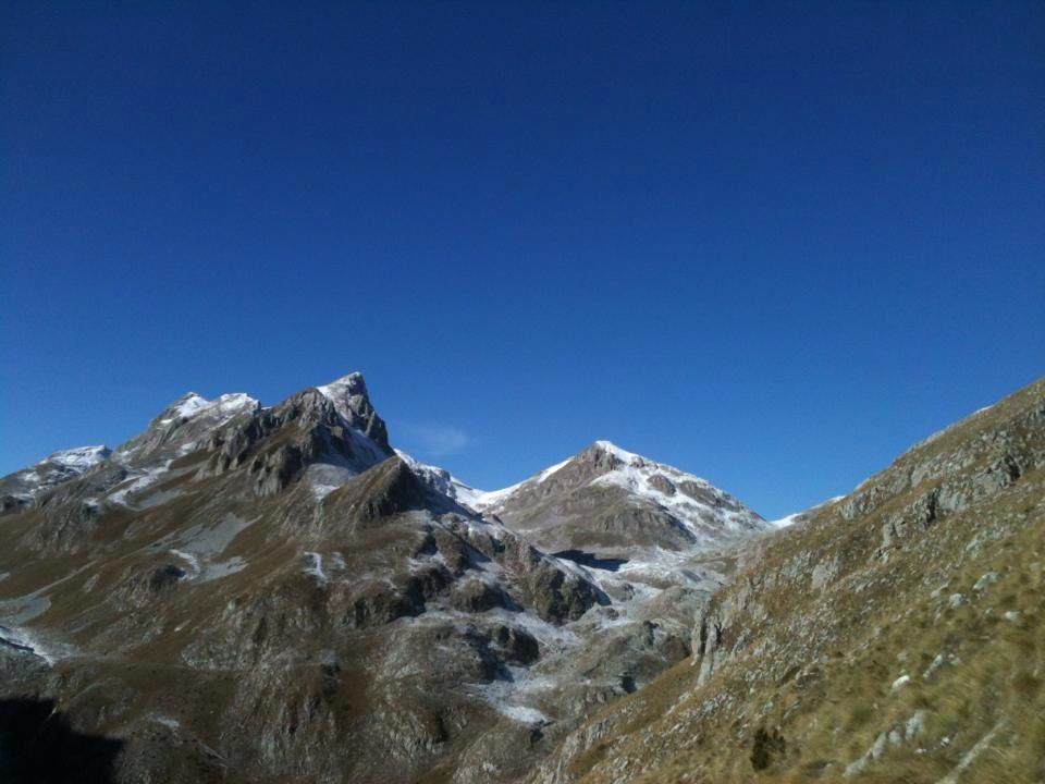 Maje te thepisura ne bjeshken e Radeshit ne rrethin e Tropojës